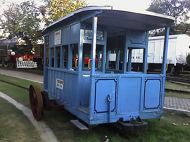 Patiala State Monorail Coach